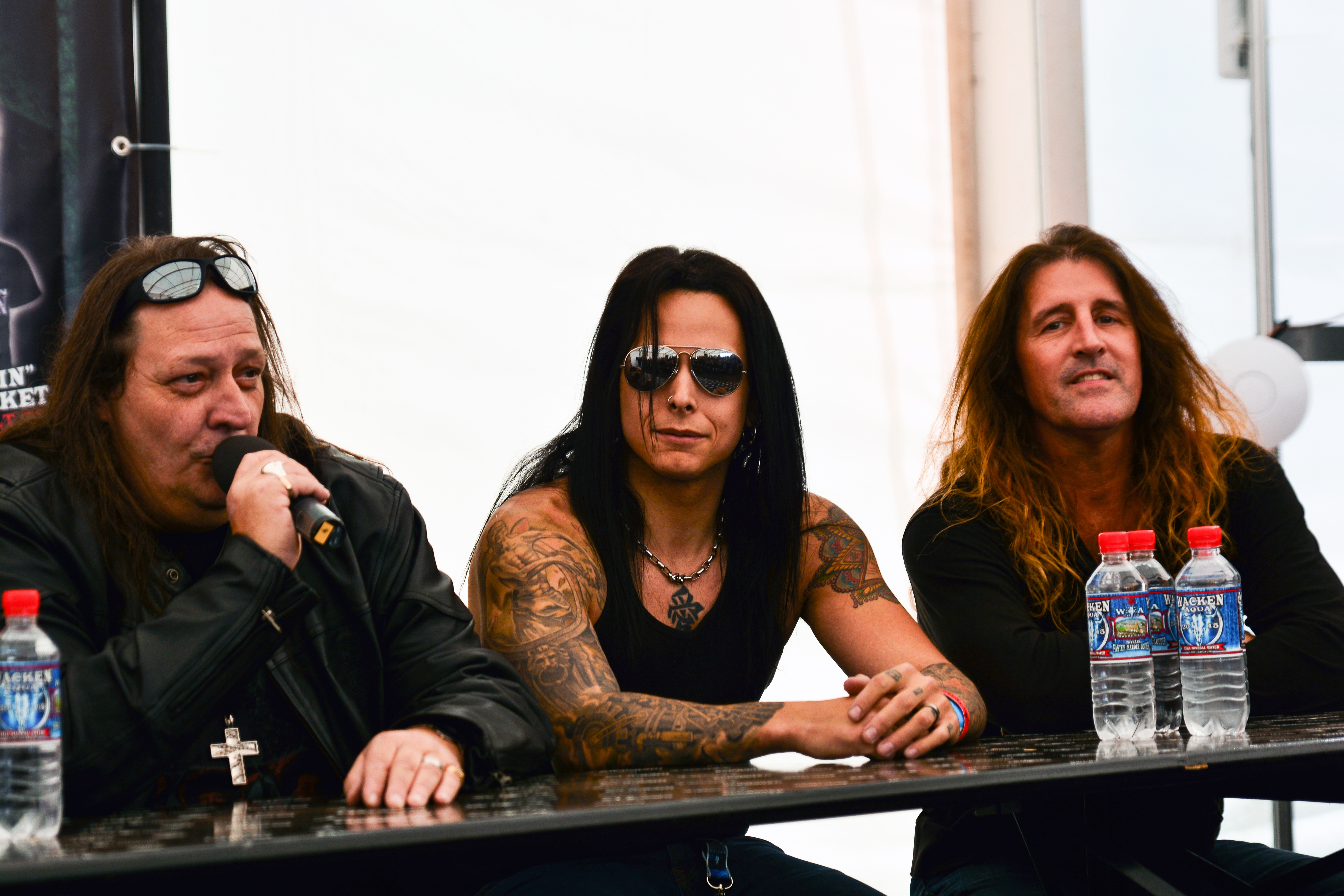 Savatage bei einer Pressekonferenz während des Wacken Open Air 2015